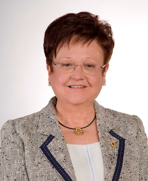 Fotografia de Luisa Pastor Lillo